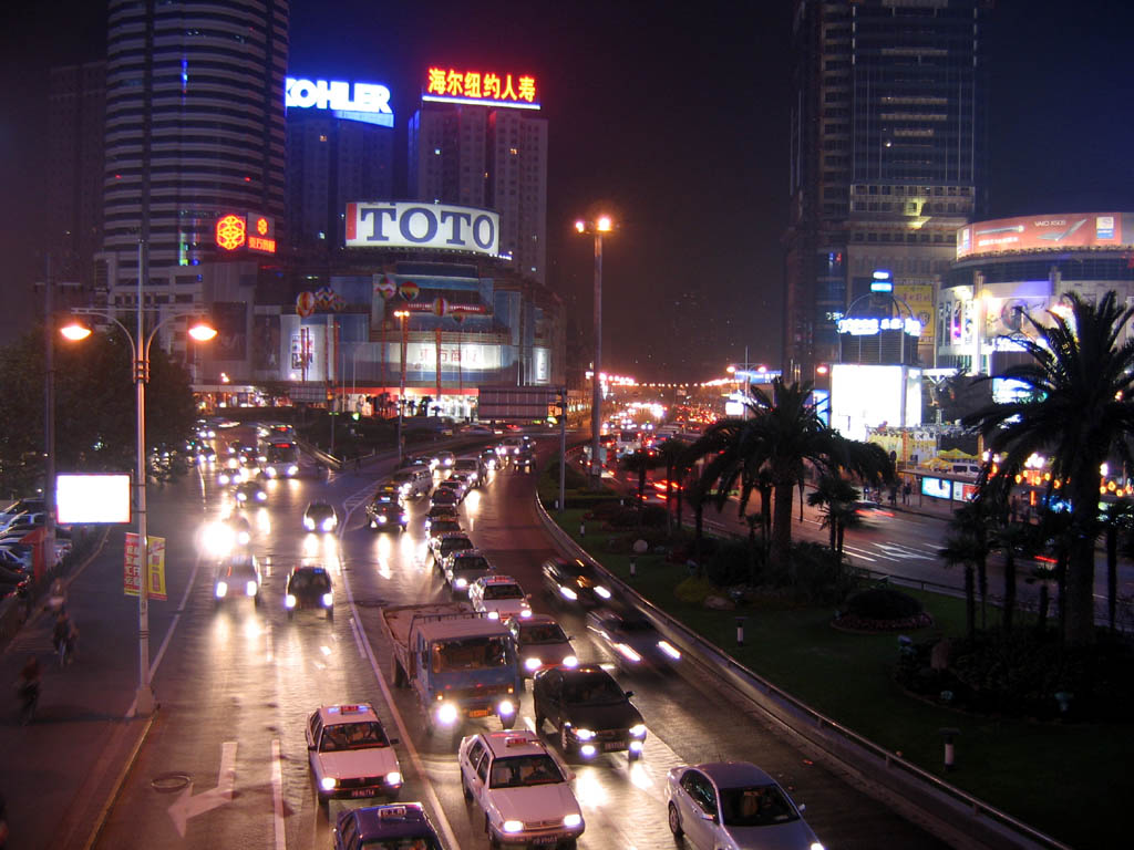 IMG_0435: Shanghai at night.